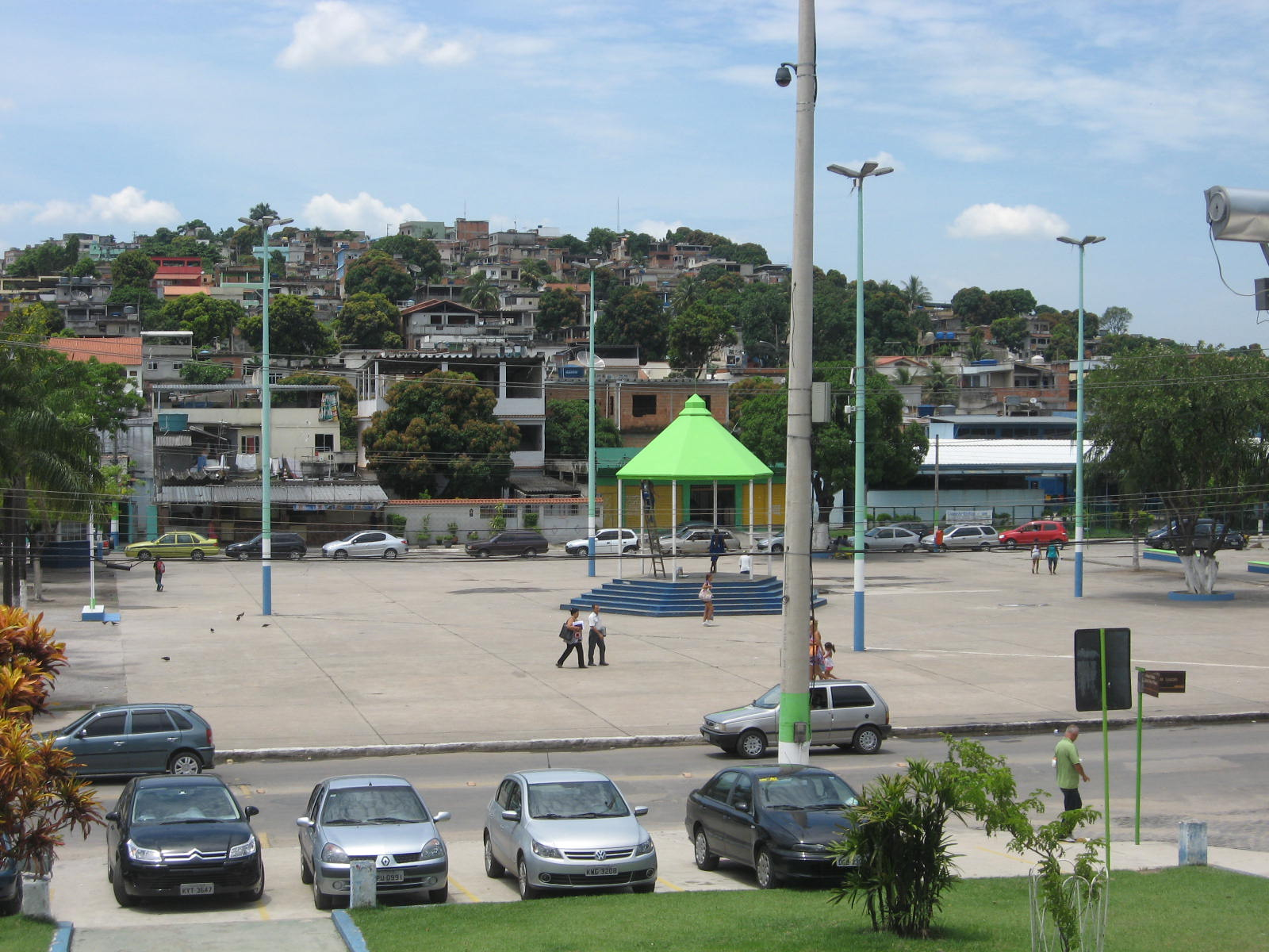 Praça dos Três Poderes, localizada em Vilar dos Teles, São João de Meriti, RJ, Brasil.